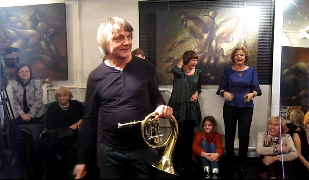 Аркадий Шилклопер